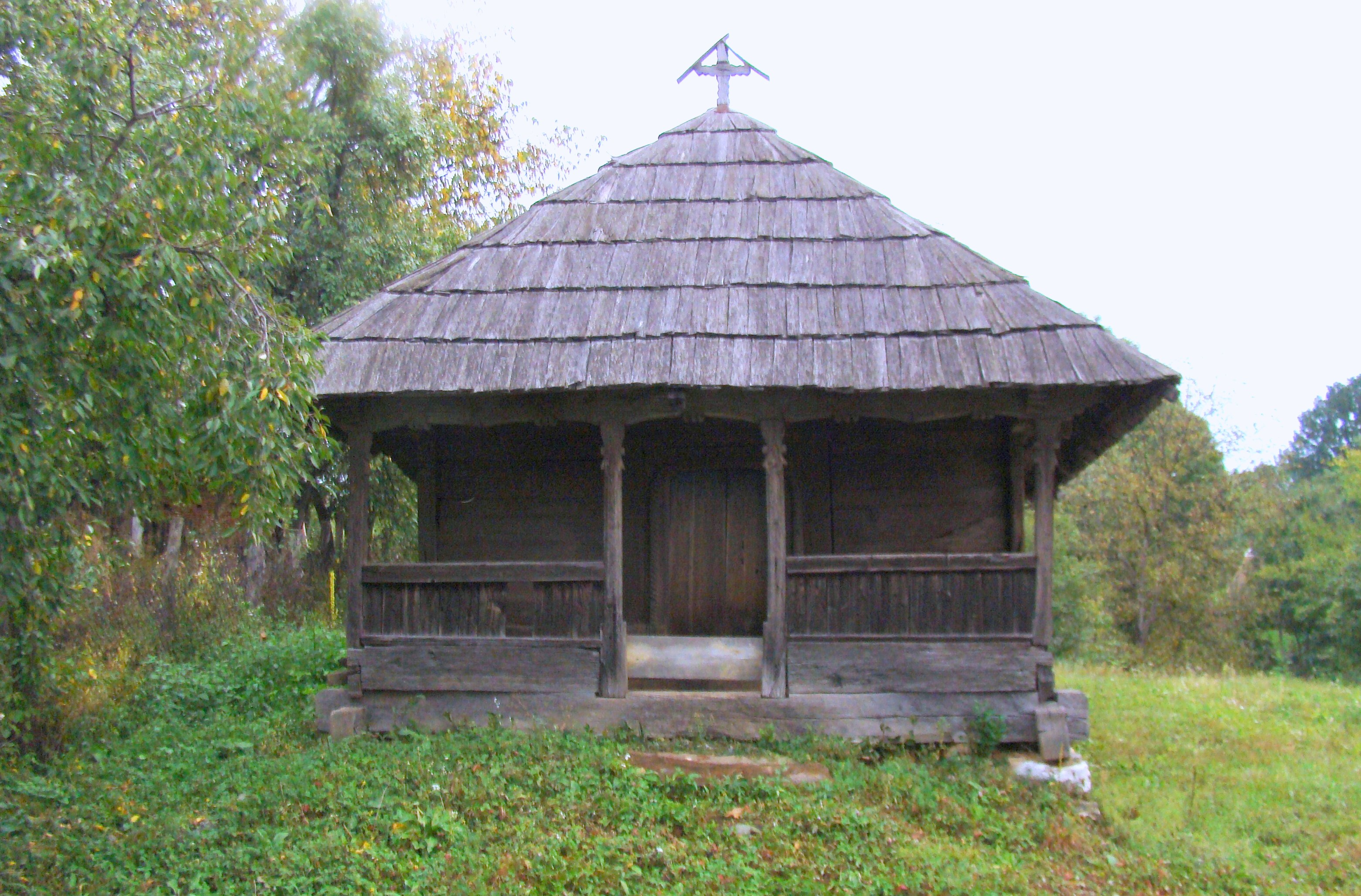 Biserica de lemn „Sf. Andrei” din Pocruia, județul Gorj